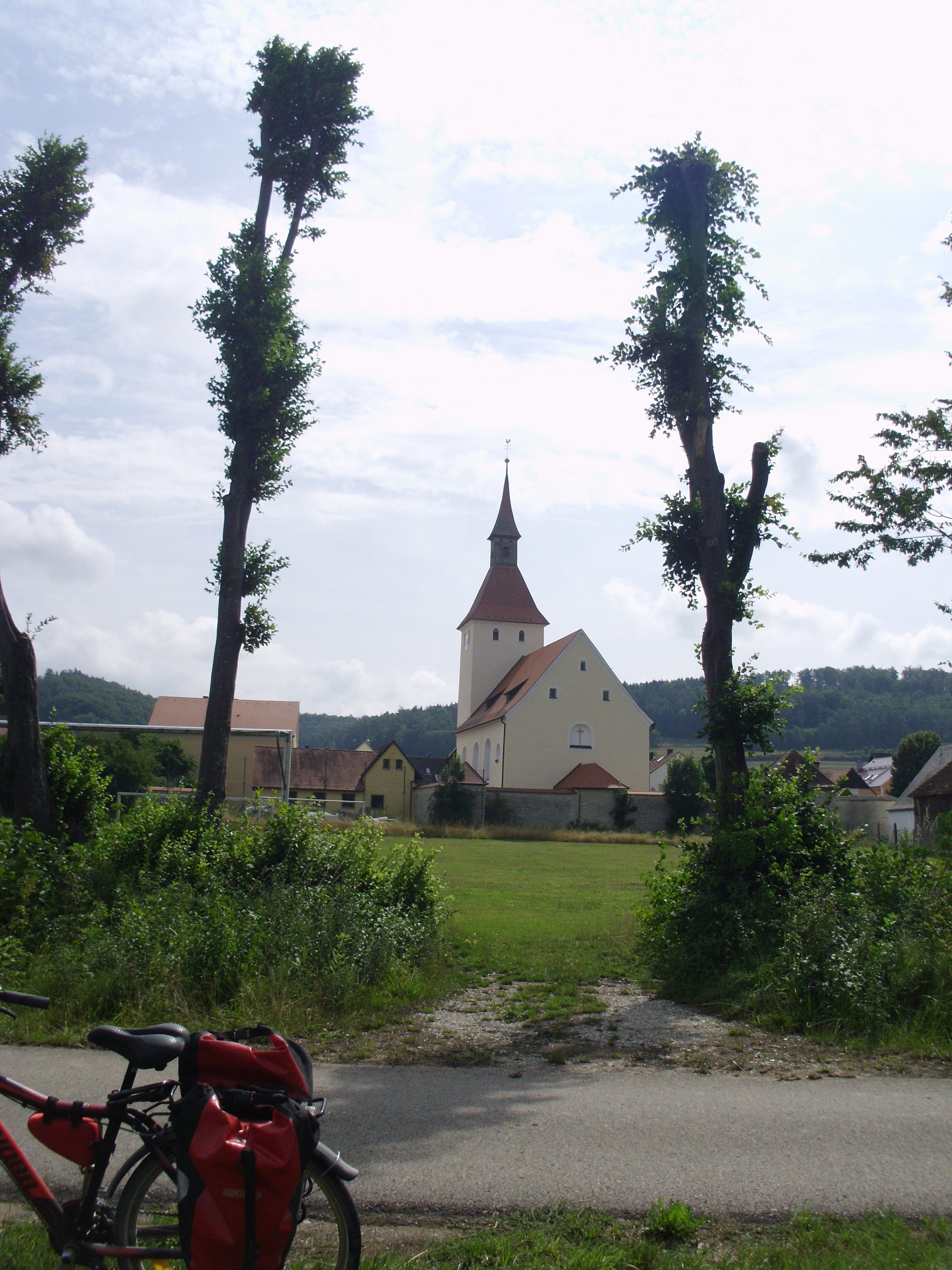 Untermässing, Ortsteil von Greding im mittelfränkischen Landkreis Roth, Baudenkmal